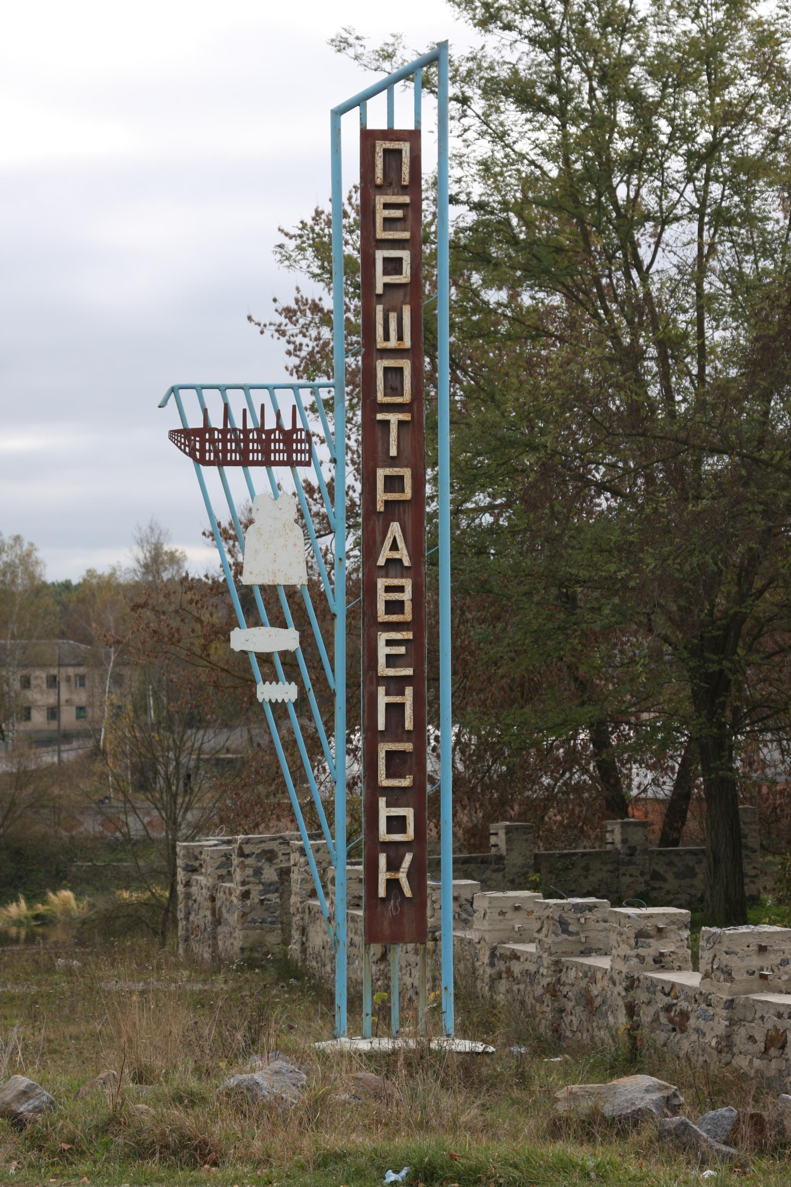 Знак перед въездом в поселок